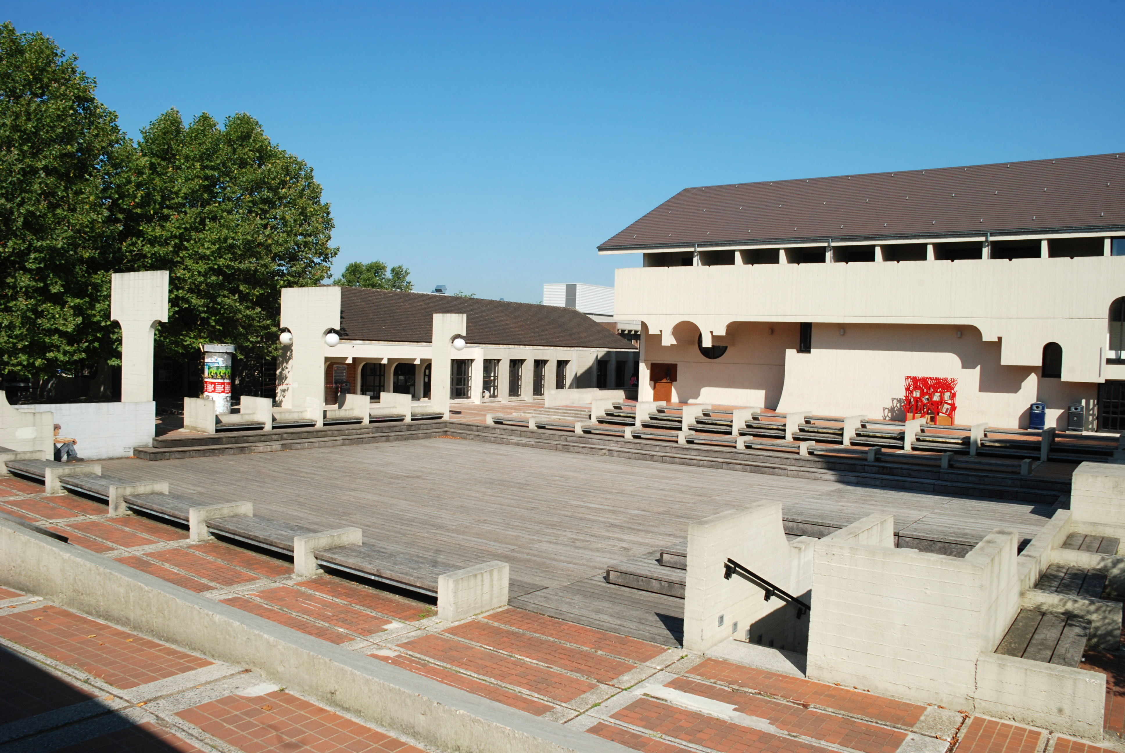 Belgique - Brabant wallon - Louvain-la-Neuve - Place des Sciences (architecture brutaliste - architecte André Jacqmain - 1972)